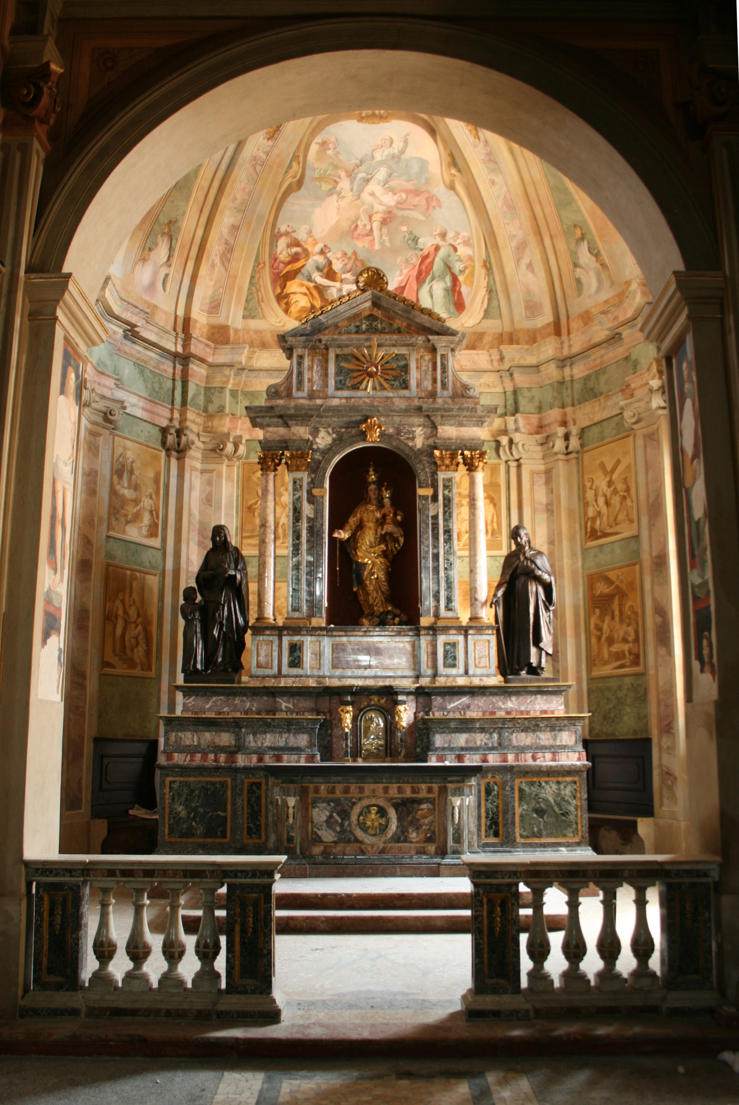 Interno della cappella della Madonna del Rosario nella chiesa dei Santi Stefano e Lorenzo a Olgiate Olona, progettata da Biagio Bellotti nel 1765 e affrescata dallo stesso nel 1784-1786.